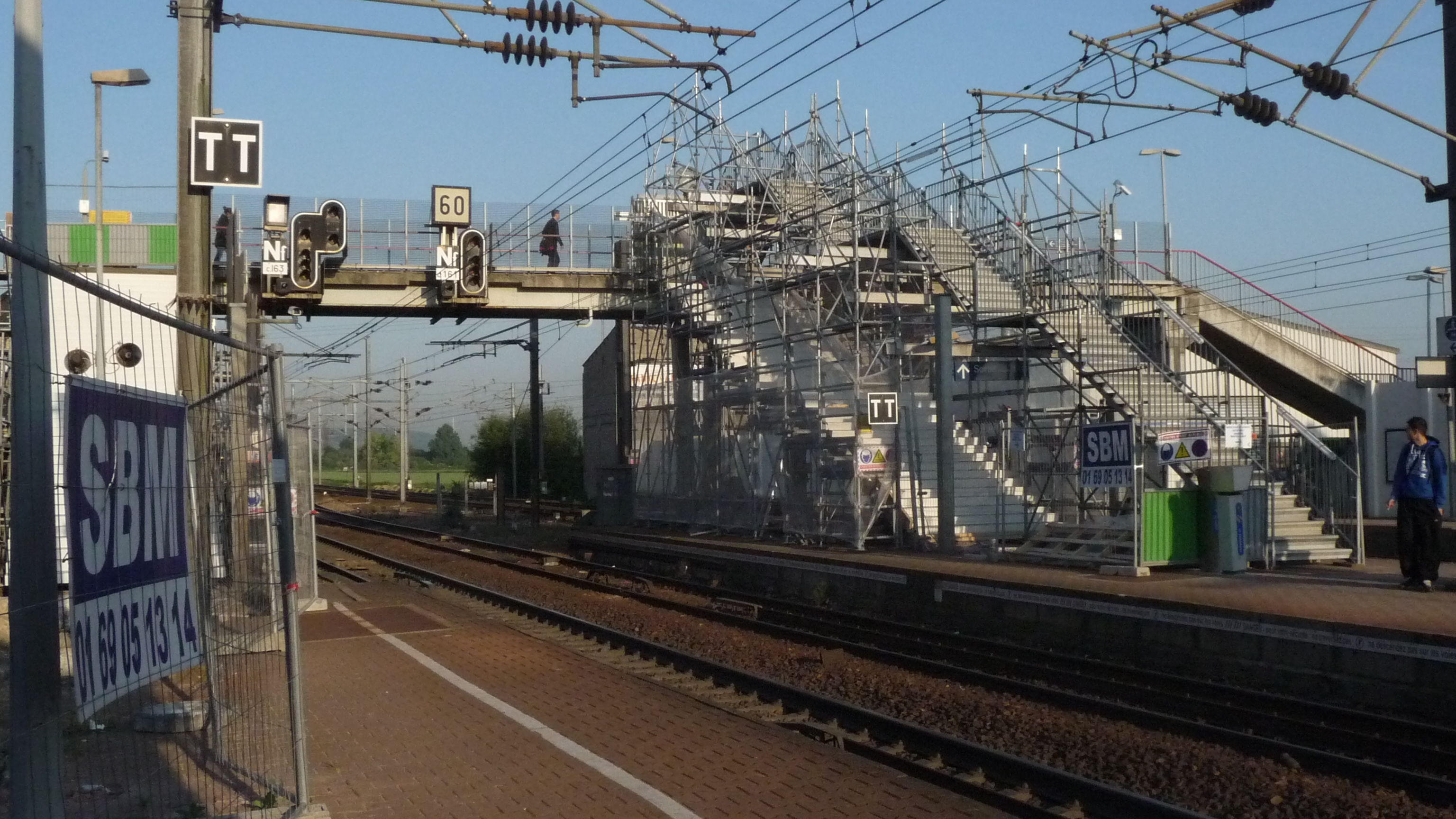 Passerelle voyageurs de la gare d'Épône-Mézières (Yvelines - France) en cours de réfection en mai 2011.